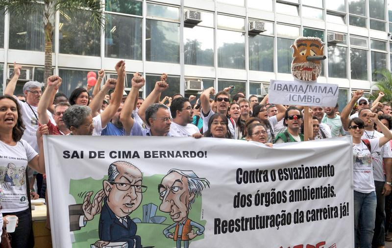 Brasília - Servidores federais da área ambiental fazem manifestação em frente ao Ministério do Planejamento pela reestruturação da carreira (Valter Campanato/ABr)